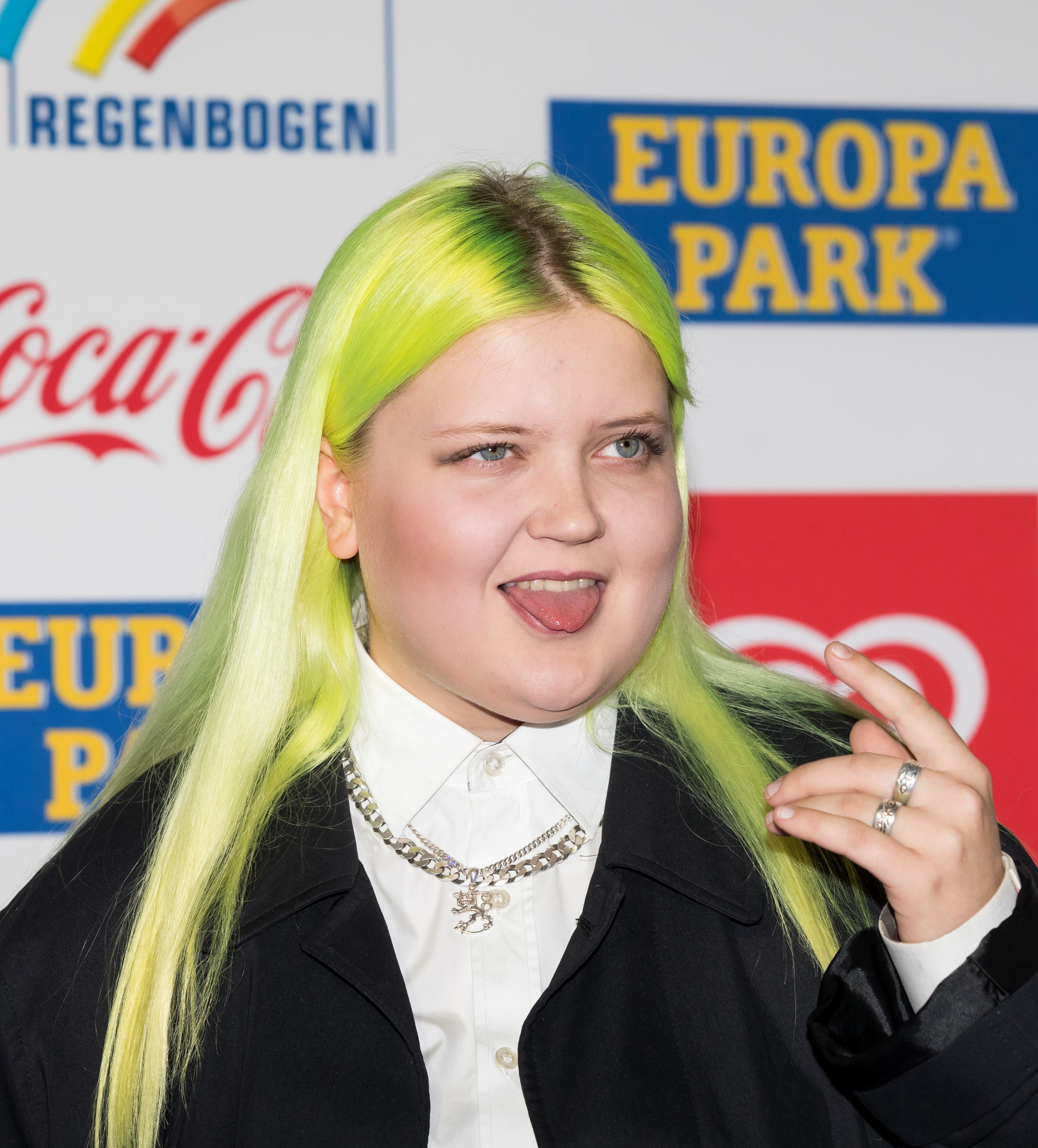 during Radio Regenbogen Award 2018 at Europapark, Rust, Baden-Württemberg, Germany on 2018-03-23, Photo: Sven Mandel